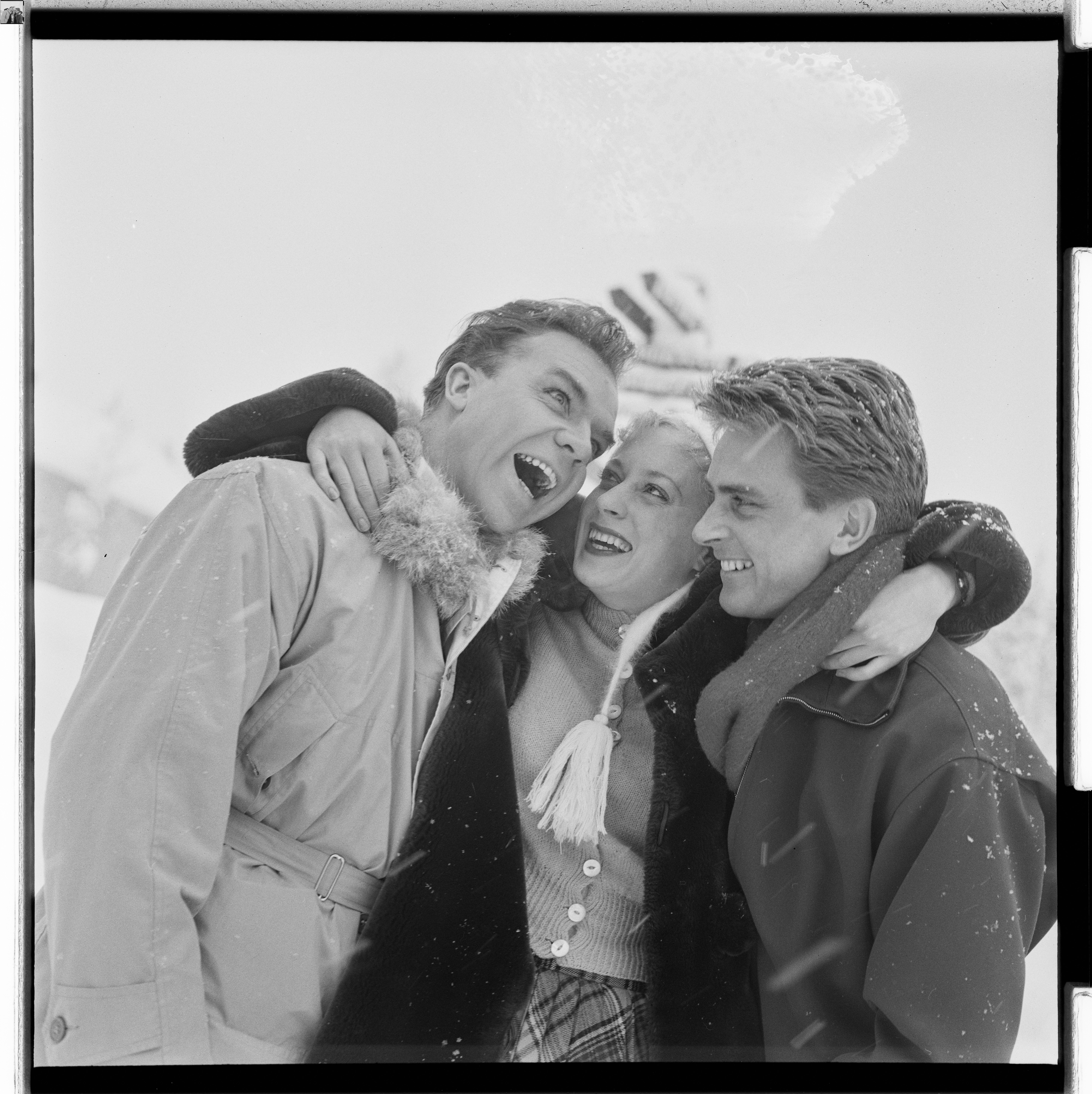 Bildet er hentet fra Arkivverket. Troll i ord fra Skeikampen Arkivinstitusjon : Riksarkivet Arkivnavn : Billedbladet NÅ Sted : Norge, Oppland, Gausdal, Skeikampen Emneord: Filminnspilling, Skuespillere Avbildet: Kolstad, Henki;Eriksen, Marius